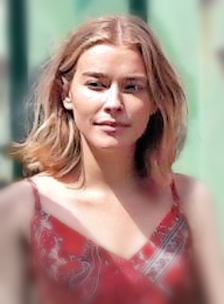 Milena Tscharntke (Isy) aus dem Team von Alles Isy beim Filmfest München 2018.